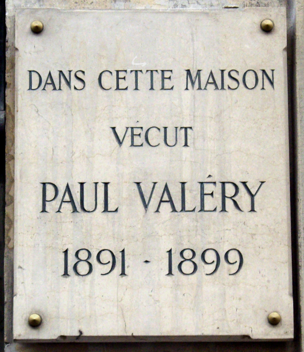 Plaque apposée au n° 12 de la rue Gay-Lussac, Paris 5e, où vécut le poète et écrivain Paul Valéry (1871-1945) de 1891 à 1899.